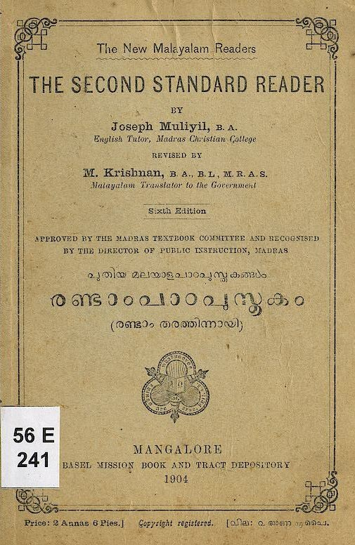 1904 ലെ രണ്ടാം ക്ലാസ്സ് പാഠപുസ്തകം